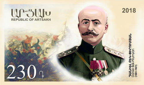 Daniel Bek-Pirumian